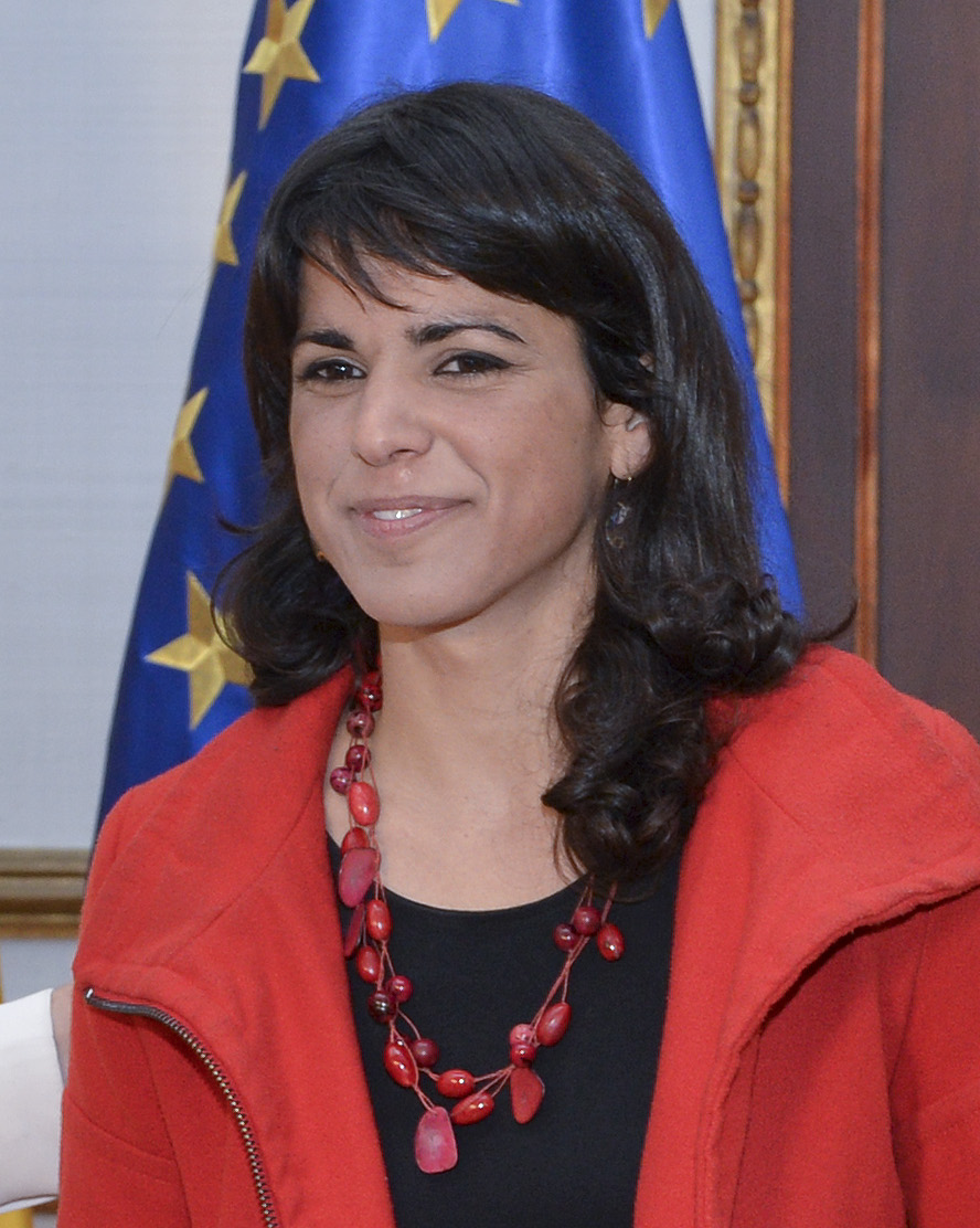 15.03.26 Reunión con Podemos 5